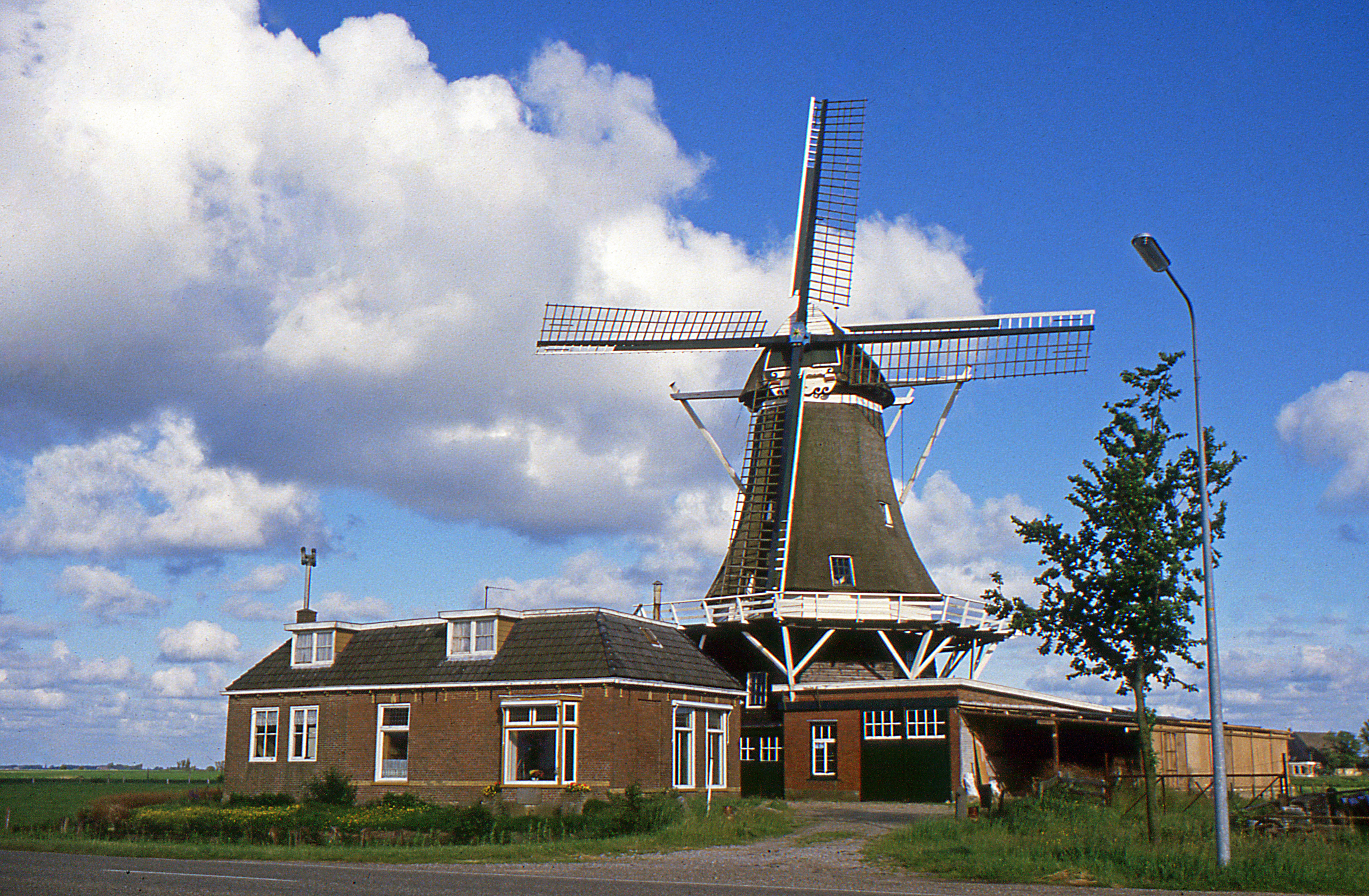 Molen De Korenaar omstreeks 1985.